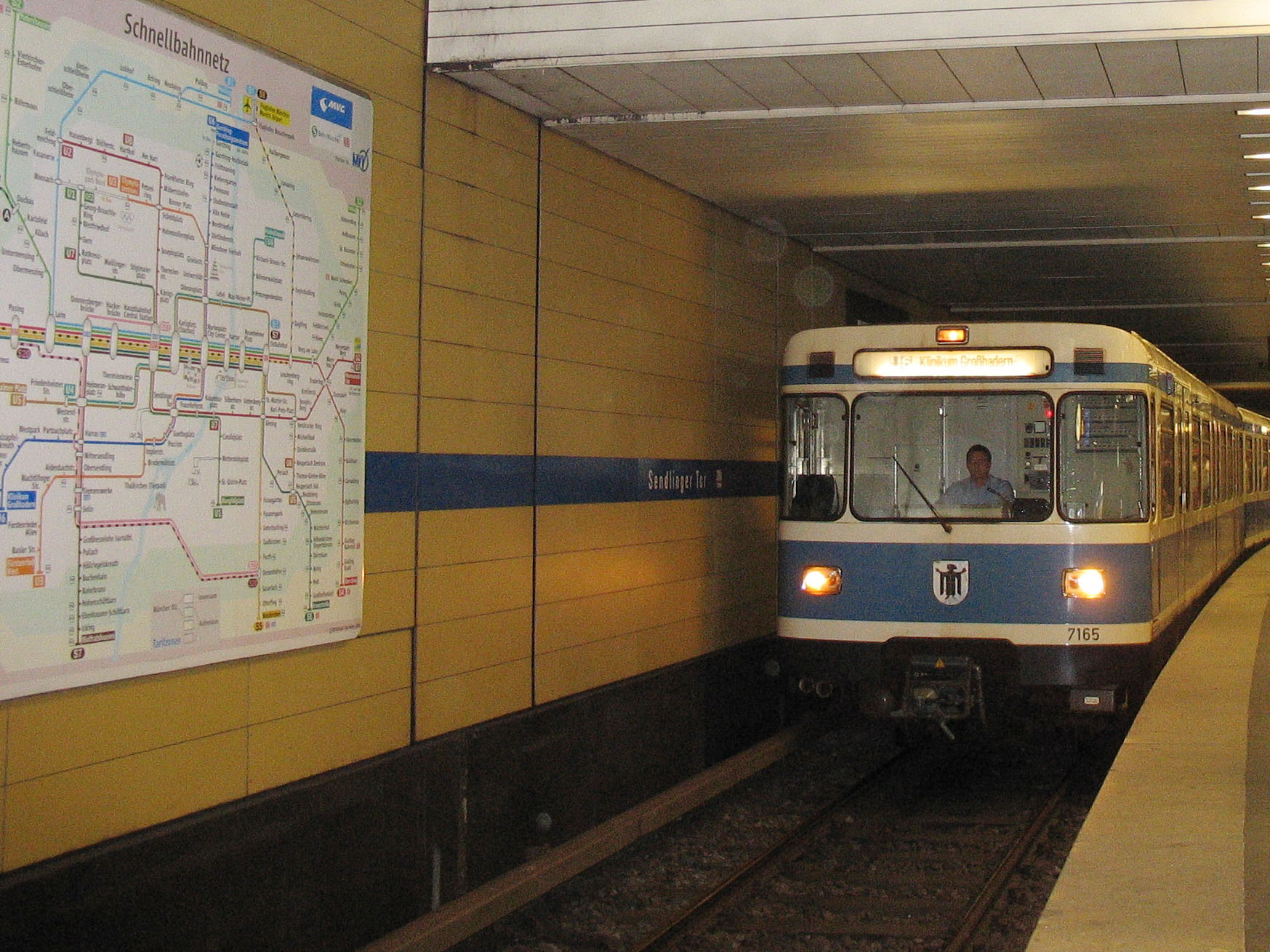 Ein Zug der Linie U6 im U-Bahnhof Sendlinger Tor in Richtung Klinikum Großhadern